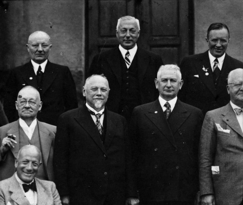 Friedrich Flick mit Industriellen Zentralbild Deutsche Industrielle 1937 Obere Reihe von links: Dr Terberger, Raabe, Krugmann; Untere " " " : Dr. Friedrich Flick, Dr. Eugen Böhringer, Konsul Stein; sitzend: Robert Röchling. 496 - 47 [Friedrich Flick mit Mitgliedern des Vorstandes und des Aufsichtsrates der Maxhütte.] Abgebildete Personen: Flick, Friedrich: Industrieller, Präsident des Flick-Konzerns, Bundesrepublik Deutschland Böhringer, Eugen Dr. Ing.: Industrieller, Deutschland (PND 133290832) Röchling, Robert: Großindustrieller, Deutschland